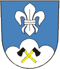 znak obce